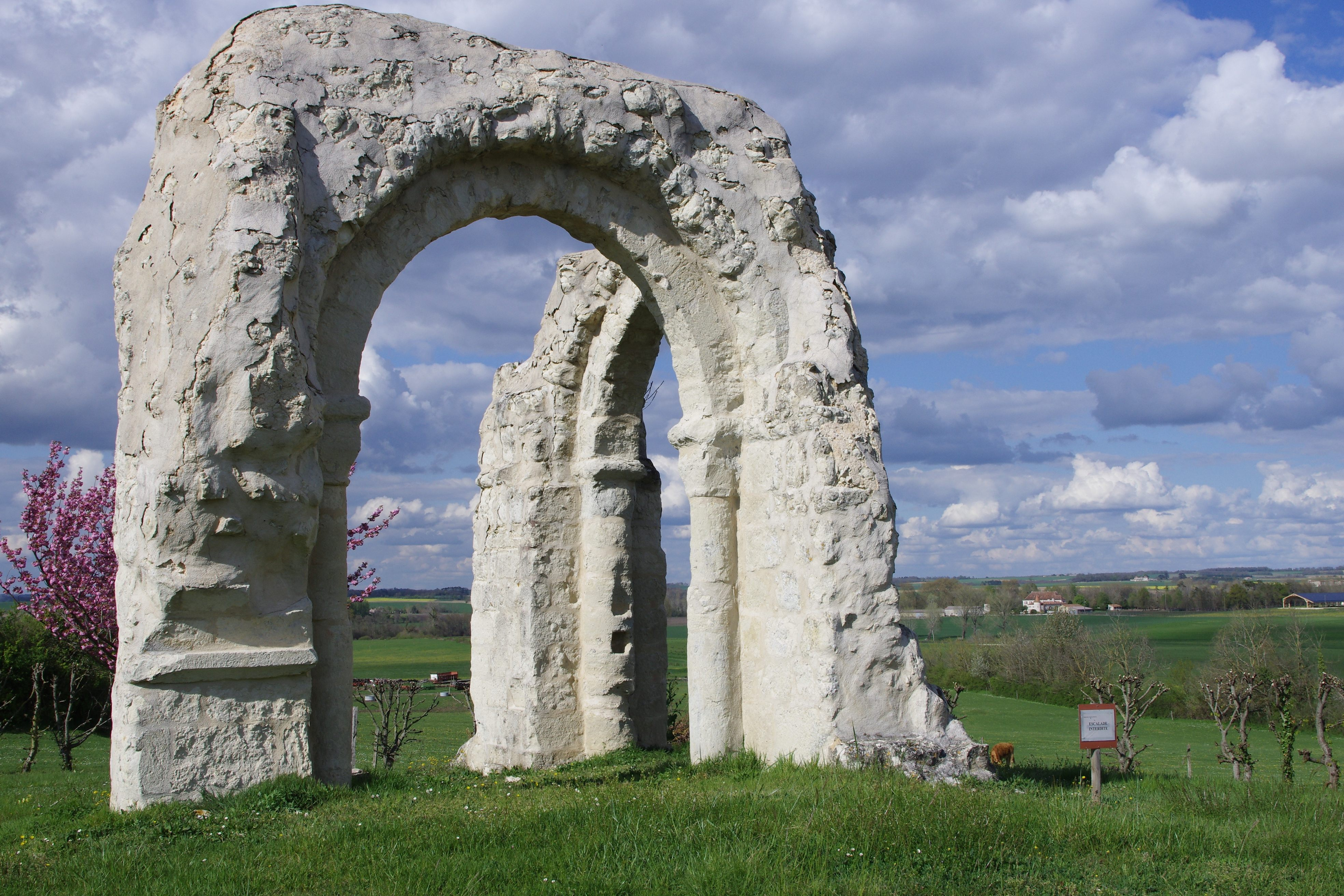 Vestiges de l'église Saint-Jean et paysage, Grésignac, Dordogne, France. .